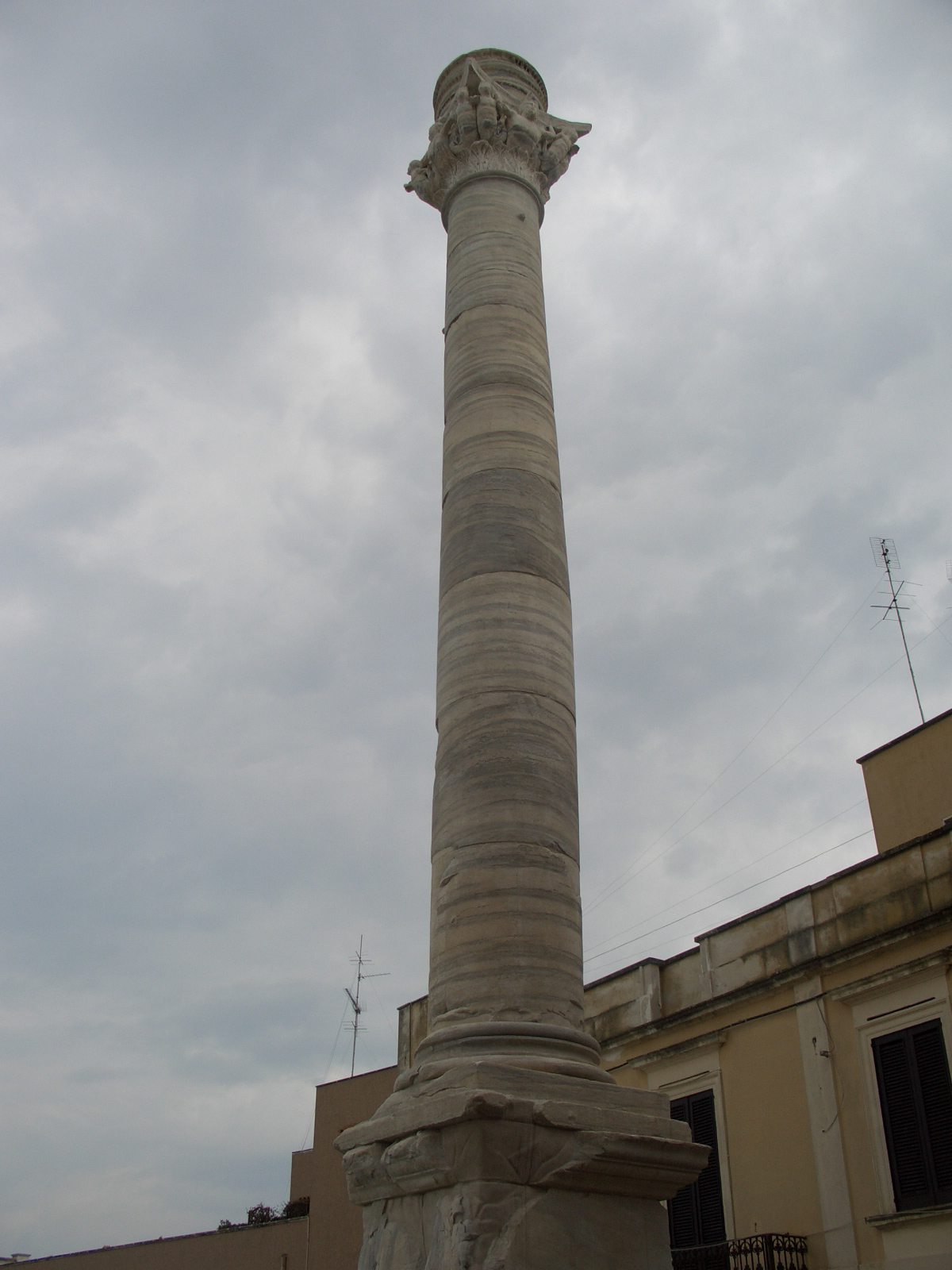 Brindisi, Italia